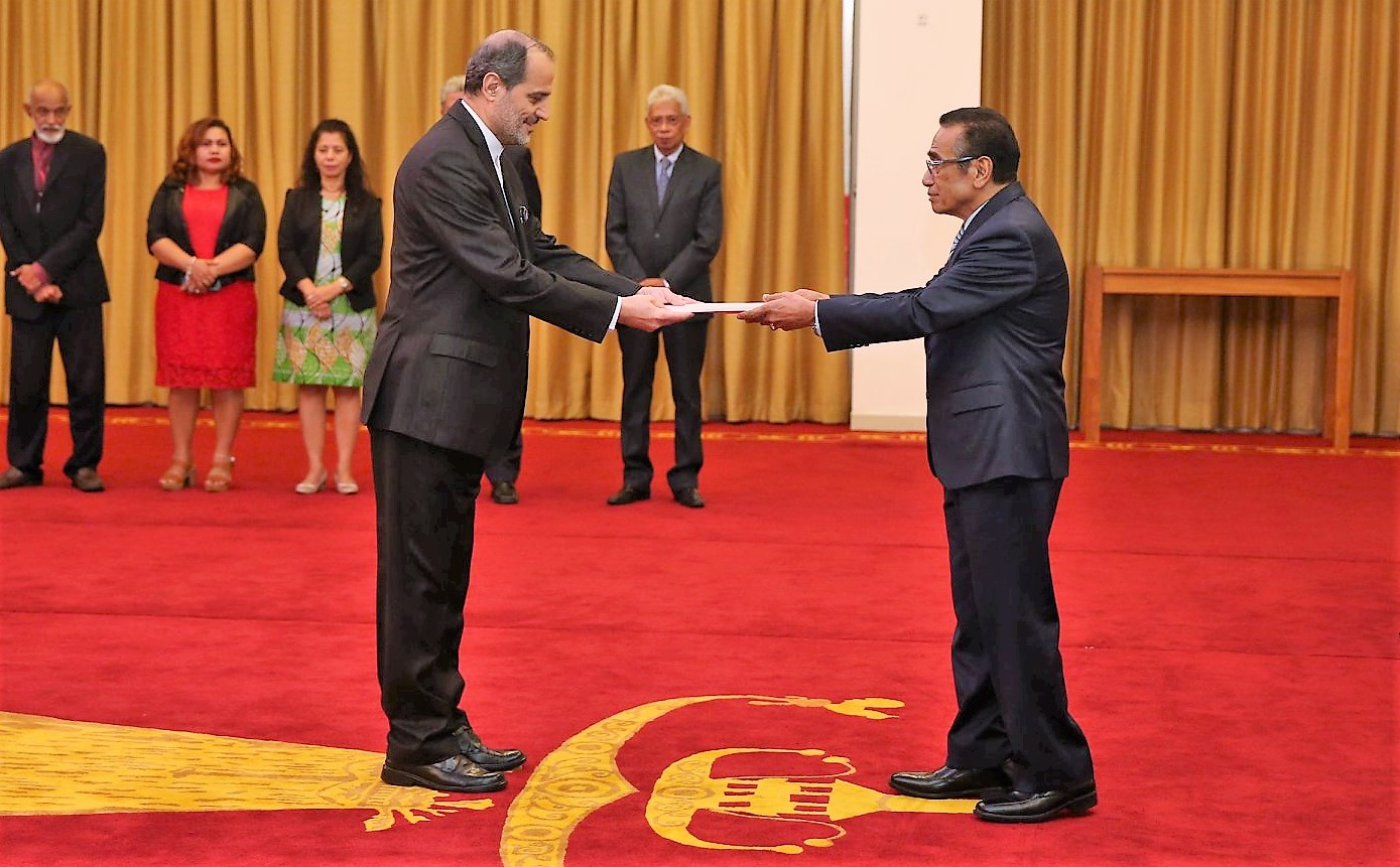 2020-02-20 Mohammad Khosh Heikal Azad, iranischer Botschafter in Osttimor, am Tag der Übergabe seiner Akkreditierung, mit Staatspräsident Francisco Guterres